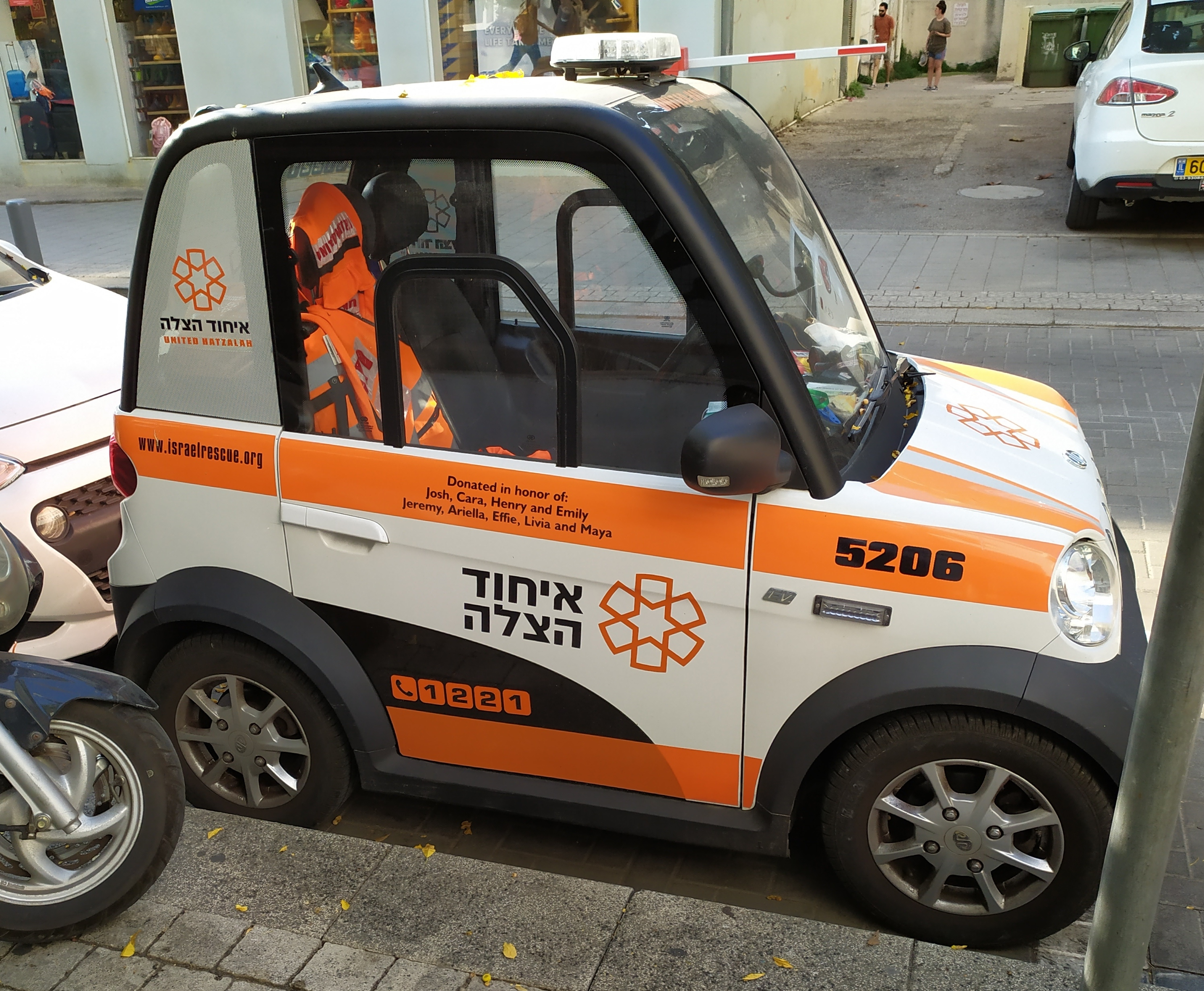 רכב חשמלי לכונן איחוד והצלה